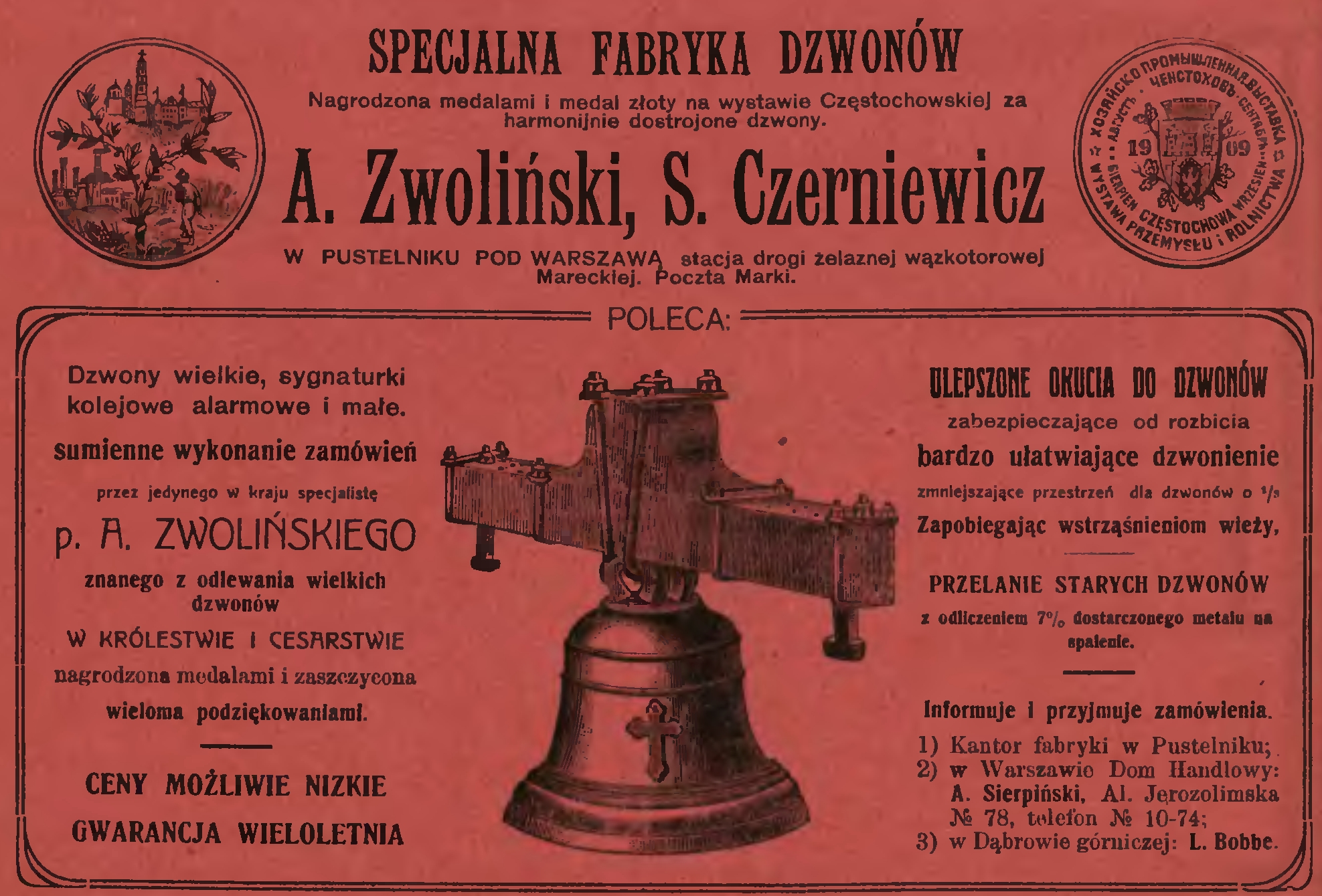 Reklama Odlewni A. Zwoliński & S. Czerniewicz w Pustelniku pod Warszawą (Kalendarz Ilustrowany "Kuriera Wileńskiego" na rok 1910)